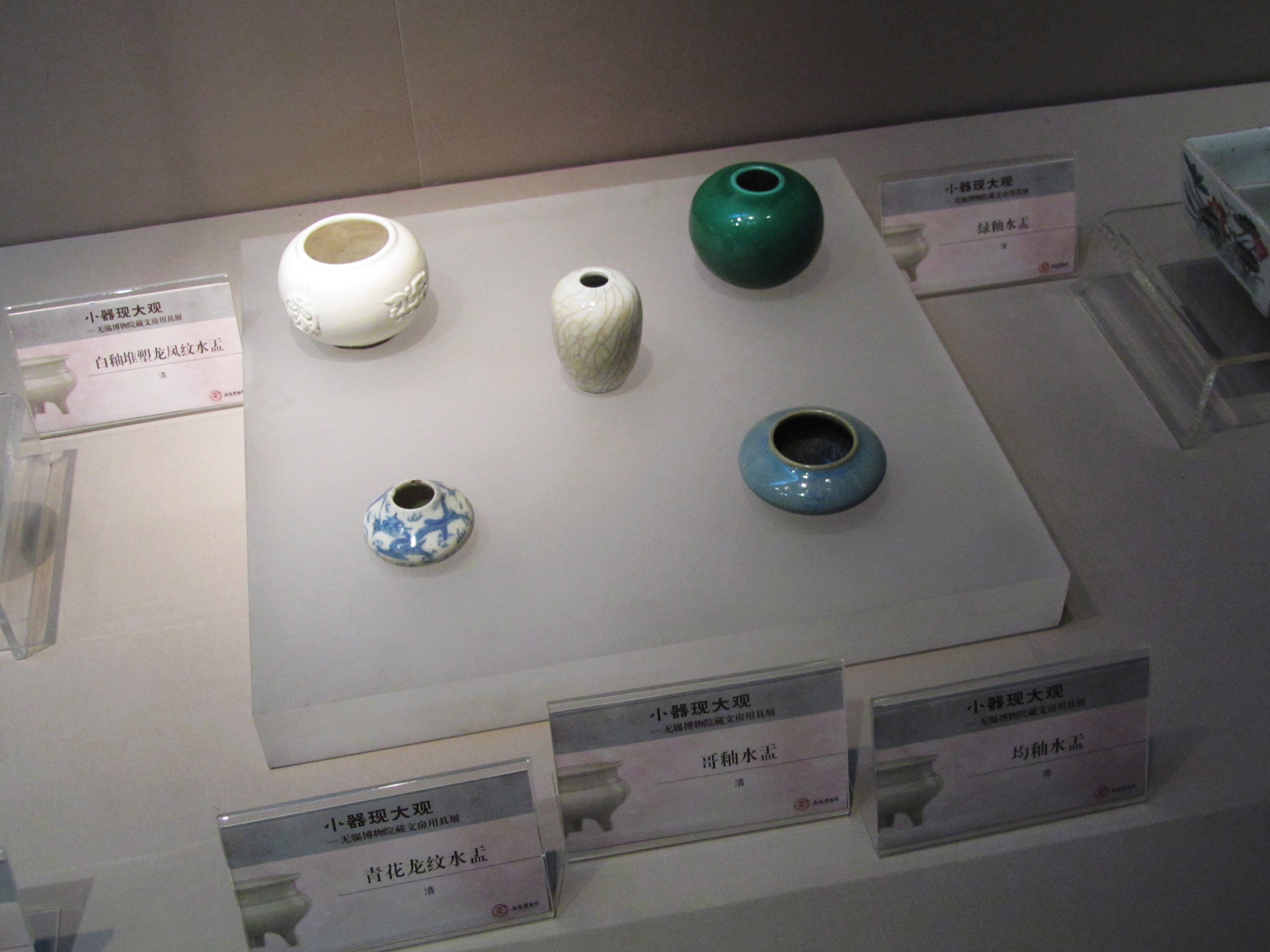 不同样式的清代水盂，无锡博物院藏。